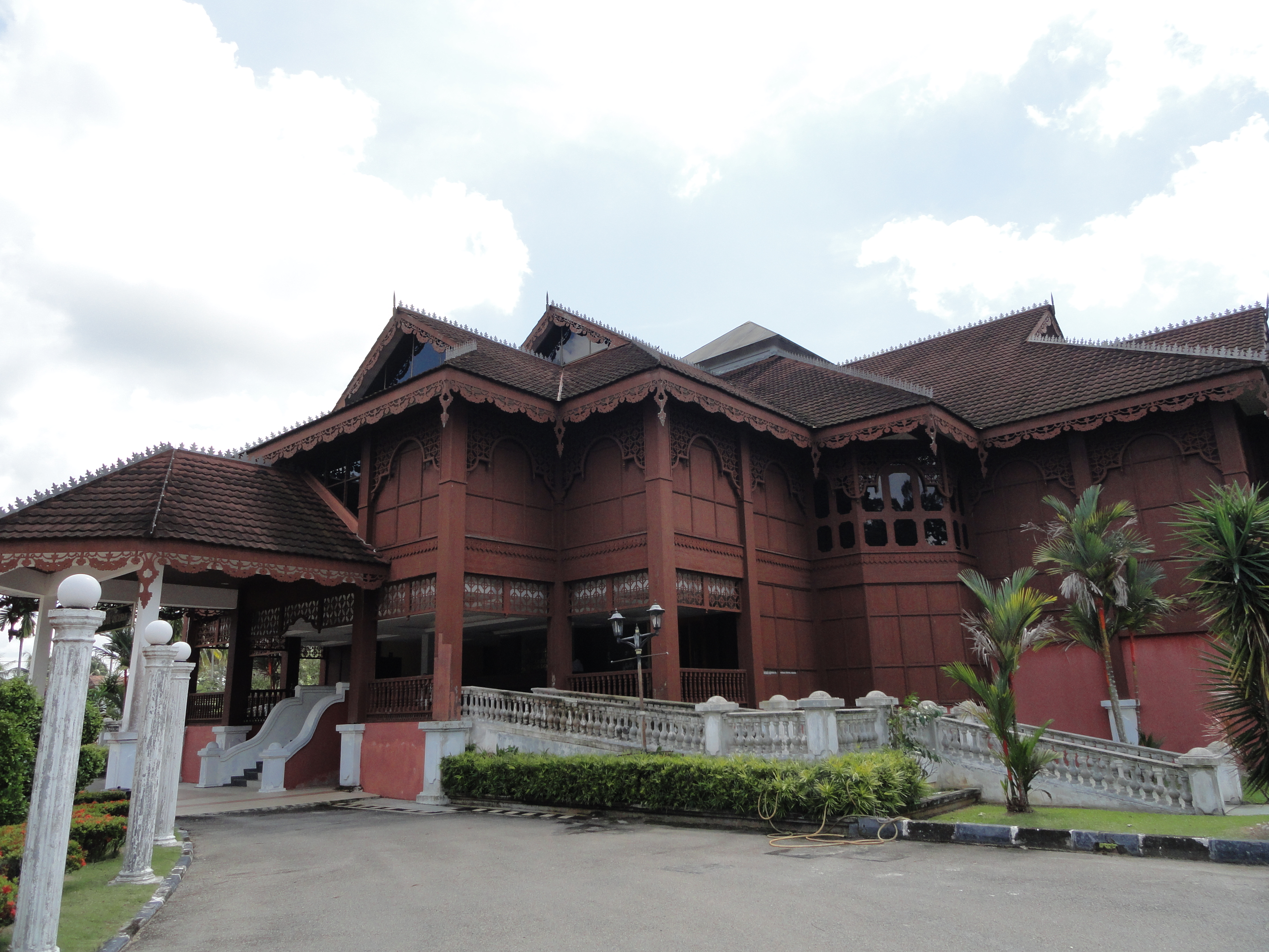 Malay Traditional House, Perak, Malaysia